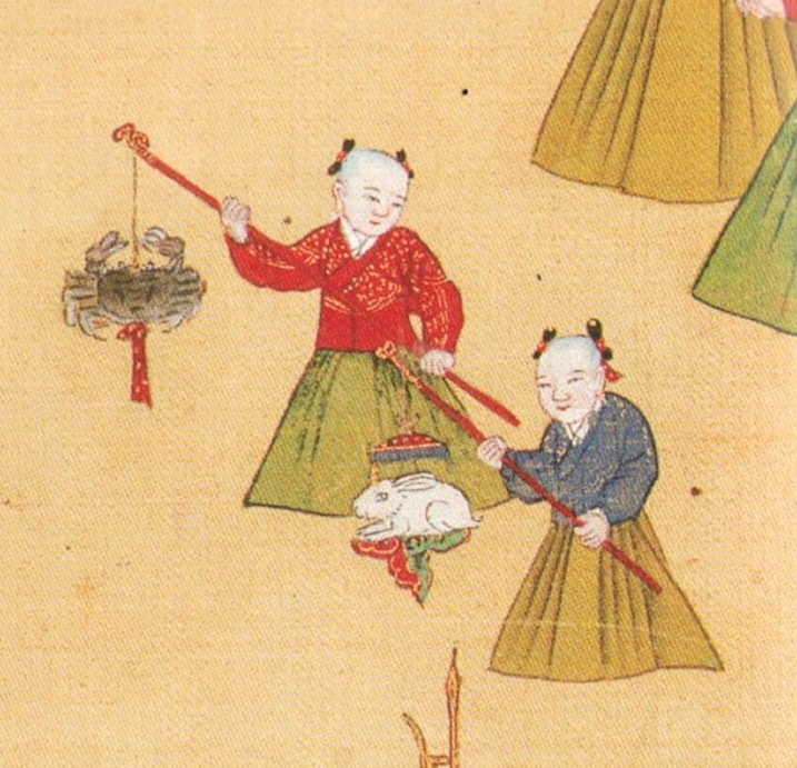 中文（香港）: 明憲宗行樂圖